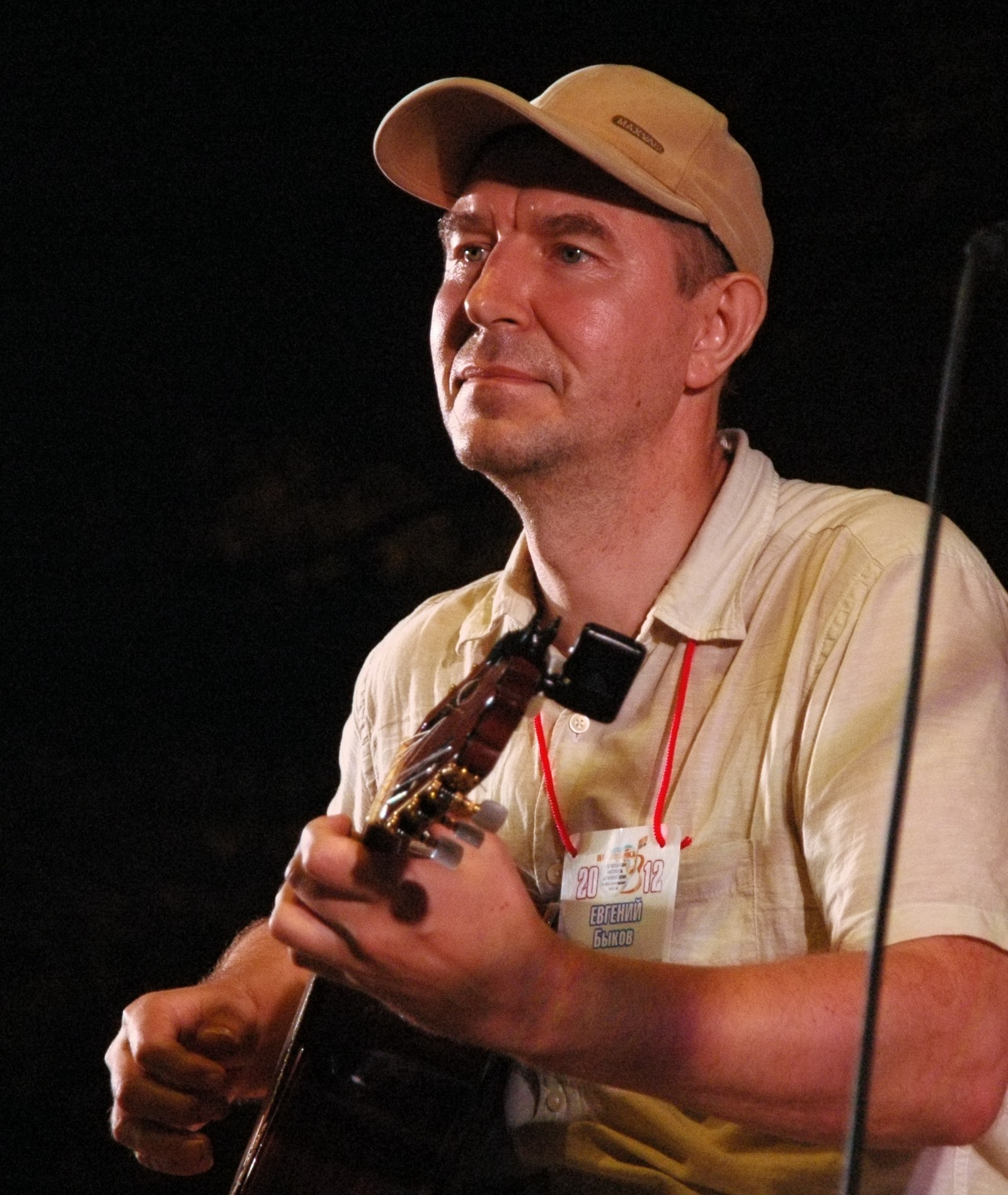 Евгений Николаевич Быков на фестивале «Платформа» в Самарской области, июль 2012